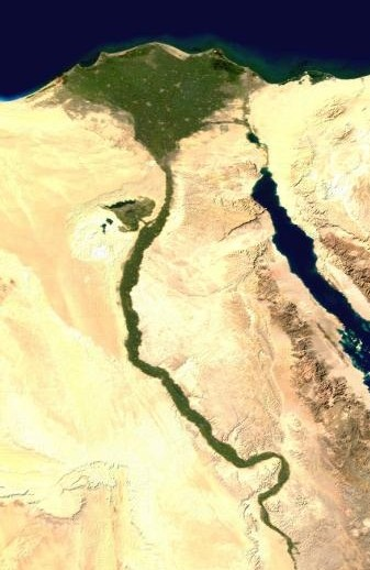 Satellitenaufnahme des Niltals, NASA